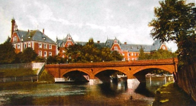 Most Królowej Jadwigi przed przebudową w 1913 r.